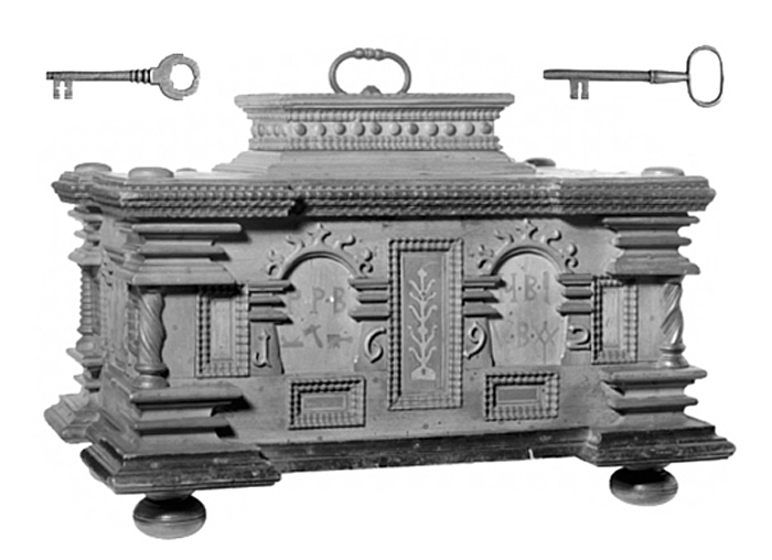 ÄMBETSLÅDA, barock, med två nycklar och skråordning jämte sigill. Av snidad och svarvad valnöt. Rektangulär, med platt fällock samt på fyra fötter. På kistans framsida årtalet 1692 i relief samt initialerna PPB, HB och VB infällda. Under initialerna en inläggningar föreställande en hyvel, en hammare, en limpanna samt en passare lagd över en vinkelhake. I kistan finns: Skrå av pergament av tre dubbelvikta ark. Utfärdad 3 juli 1693 för snickareämbetet (Schreiner-Innung) i Gericht (domsaga) Lauter i sachsen-Koburg av hertig Albrecht (1648-1699). Pergamentarken sammanhäftade med grovt silkessnöre i gult och svart samt med vidhängande sigill av rött vax inneslutet i en svarvad och polerad trädosa. På dosans lock och undersida en snidad blomma. Inköpt av Johanna Kempe 1892 hos antikhandlare Eduard Kahlert. Nyckelord: Ämbetslåda